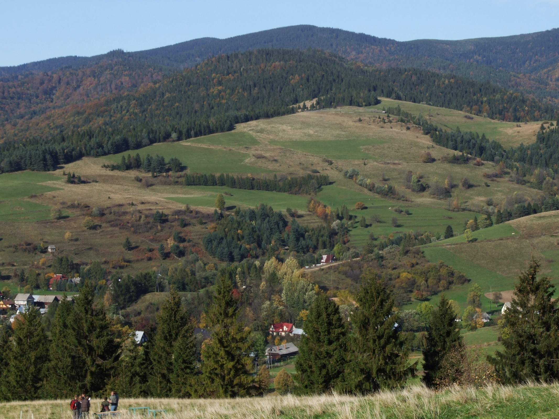 Widok z Jaworek. U góry 2 wierzchołki Złomistego Wierchu i Długa Przełęcz, pod nimi Świniarki